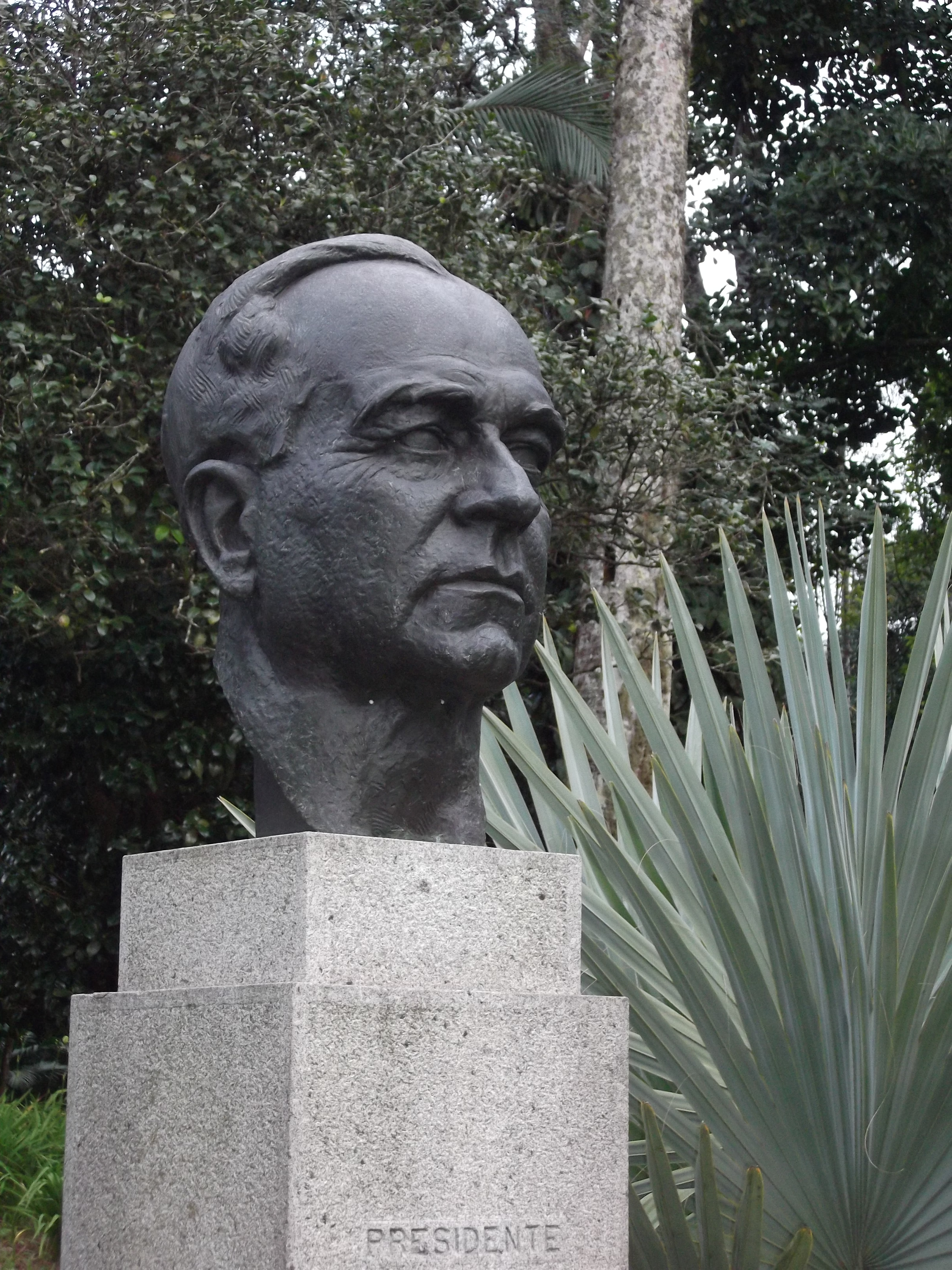 Petrópolis, estado do Rio de Janeiro, Brasil : Museu Imperial : Jardins : Busto de Getúlio Vargas